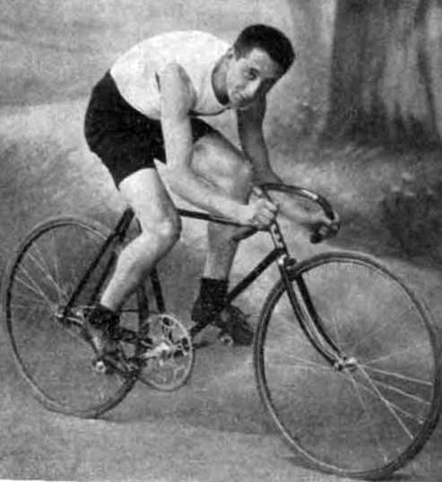 Rudolf Kramer, österreichischer Radsportler